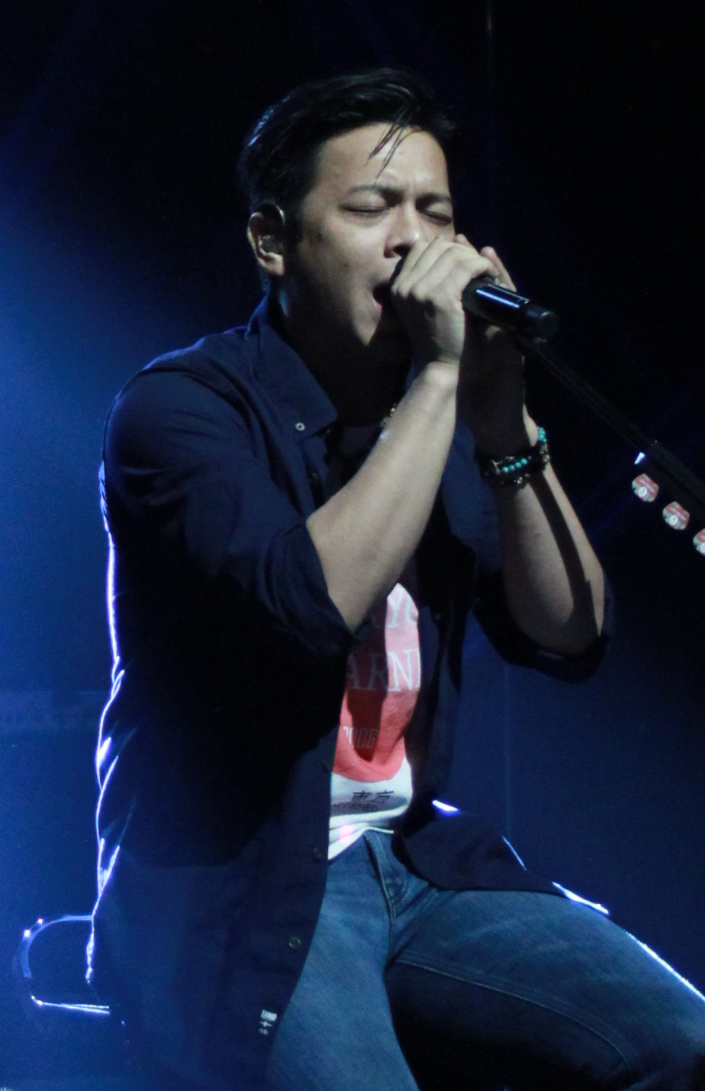 Ariel NOAH dalam sebuah konser pada Desember 2013